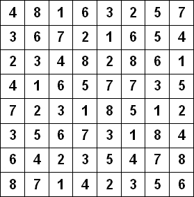 Example of a Hitori puzzle.